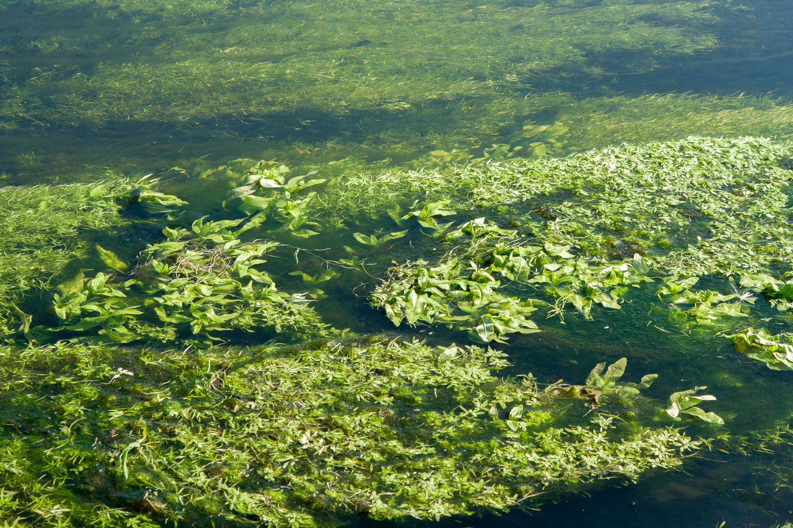 Kanał Nowa Ulga na Zakolu Wawerskim w Warszawie - roślinność wodna, gł. rzęśl.Kanał Nowa Ulga obecnie odcięty jest od pozostałej części Zakola Trasą Siekierkowską.